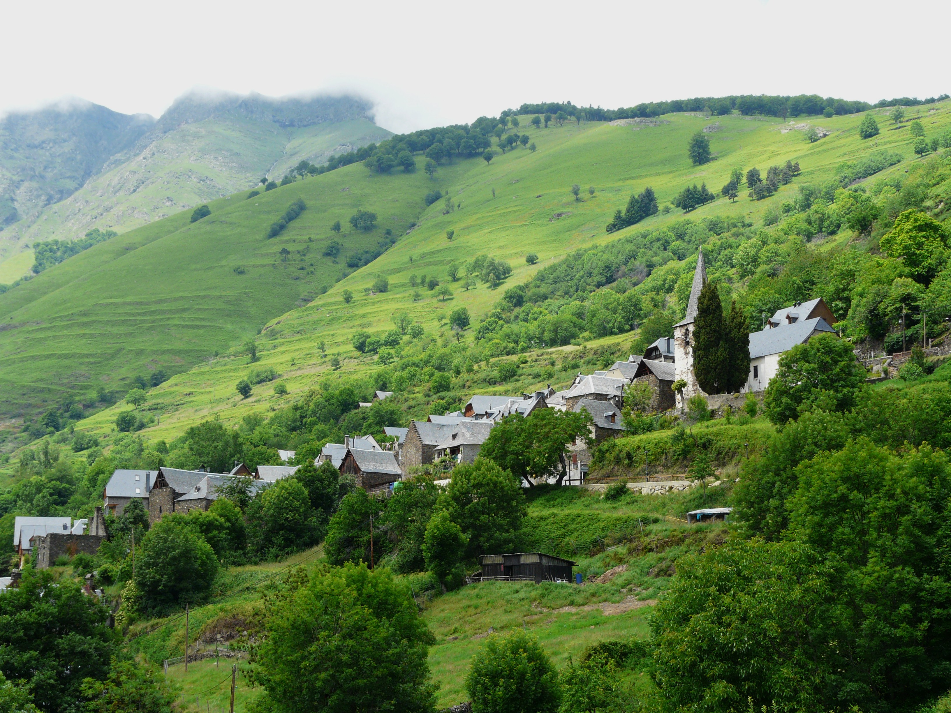 Le village de Bausen, Val d'Aran, Catalogne, Espagne.